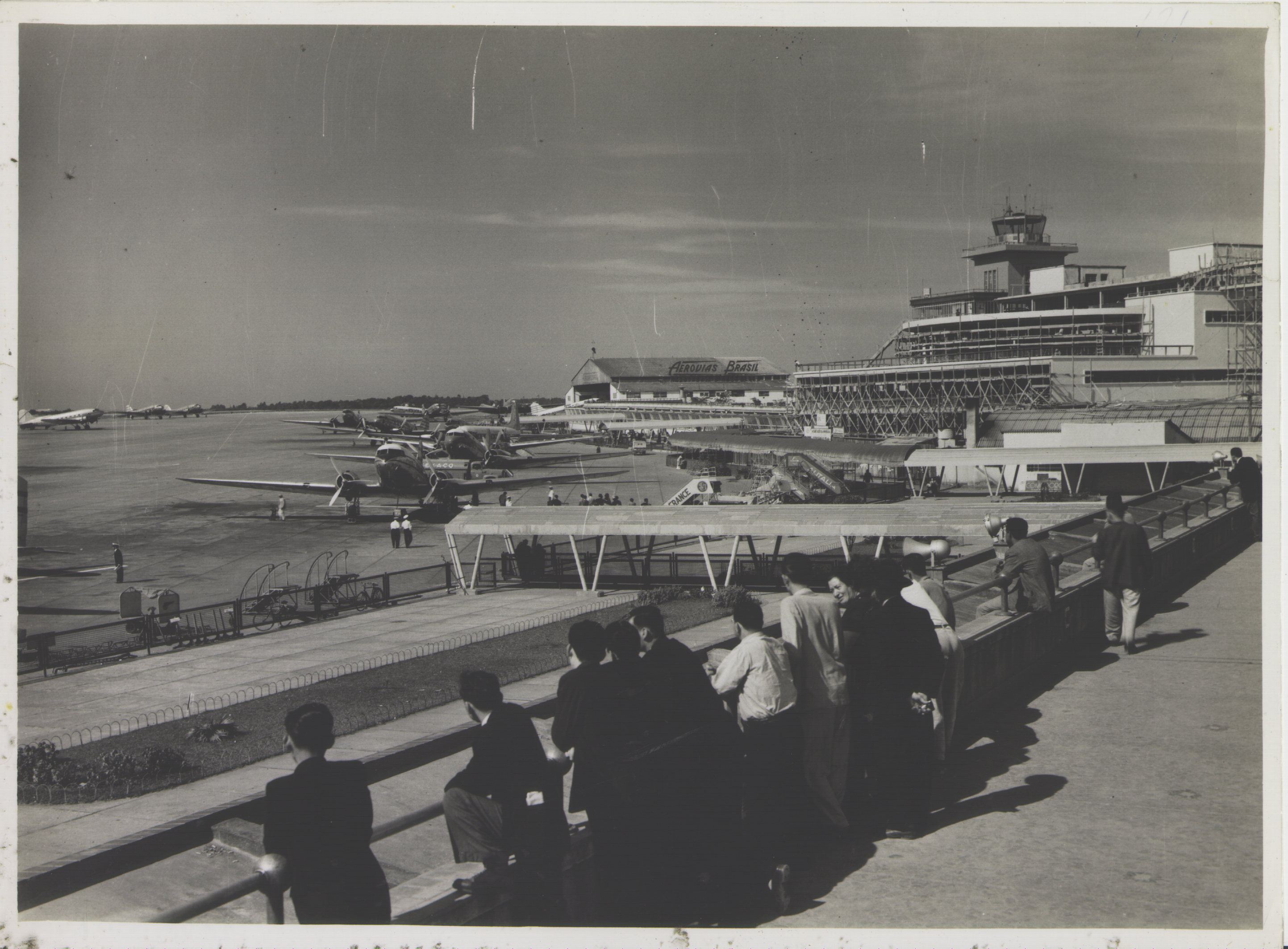 Obra que integra o acervo do Museu Paulista da USP. Coleção Werner Haberkorn